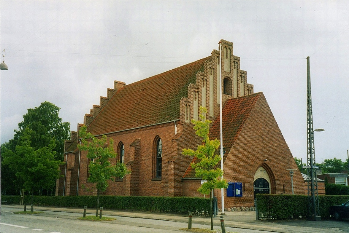 Vigerslev Kirke